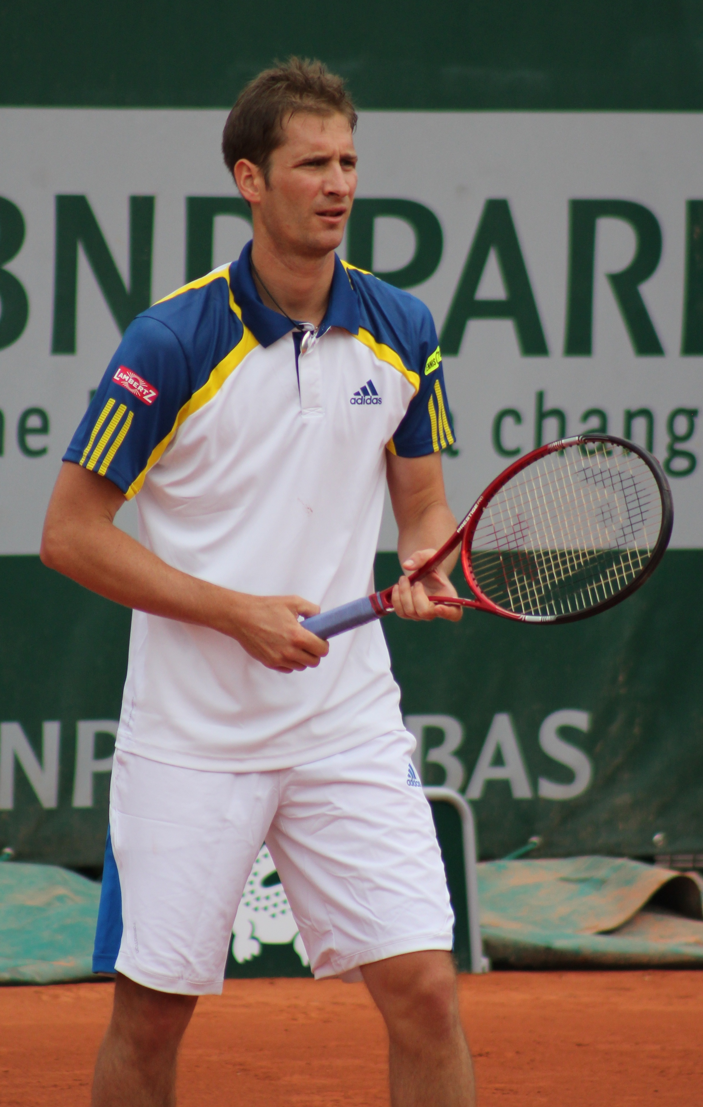 Mayer F. RG13 (4)